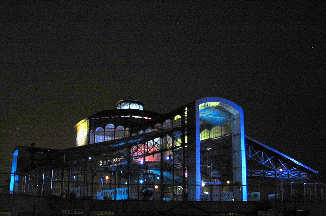 El Palacio de Cristal de Quito iluminado en una de las tantas noches frías de la capital ecuatoriana. Quito's Crystal palace, lighted in one of those thousands cold nights in the ecuadorian capital.